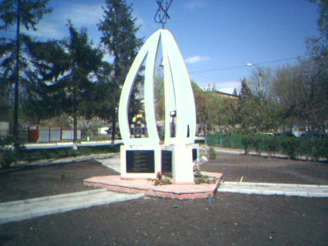 Памятник чернобыльцам